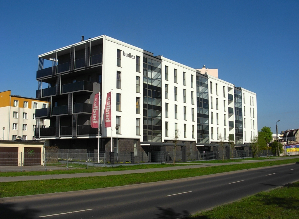 Zabudowa przy ul. Koszarowej na osiedlu Błonie w Bydgoszczy